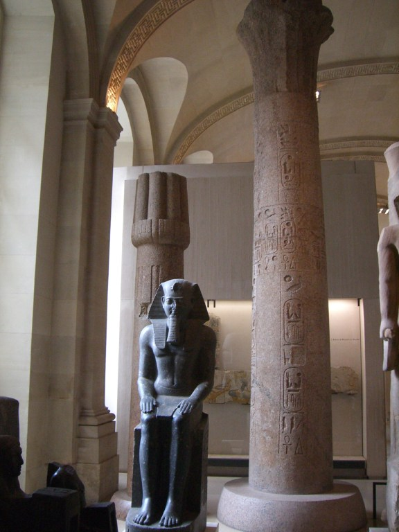 Colonne palmiforme et colosse au nom de Ramsès II, trouvés à Tanis - XIXe dynastie égyptienne